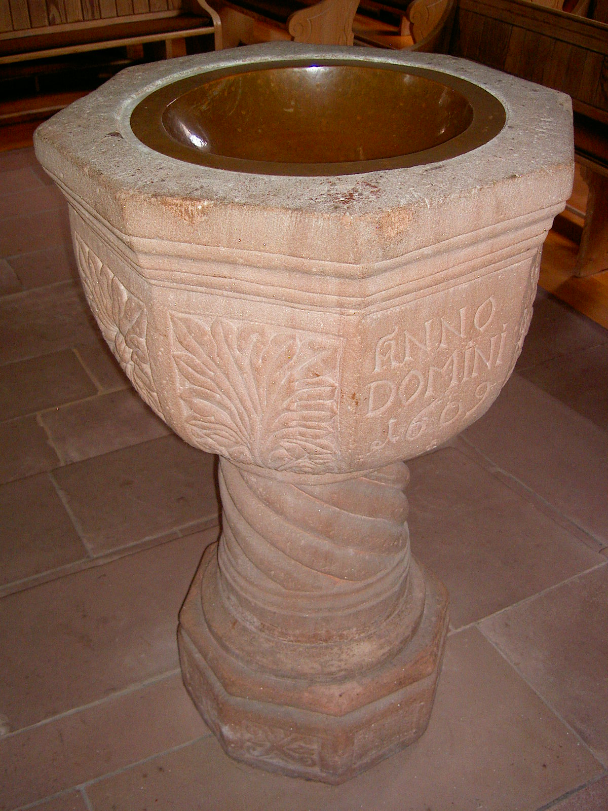 Taufstein in der Evangelischen Kirche in Trippstadt